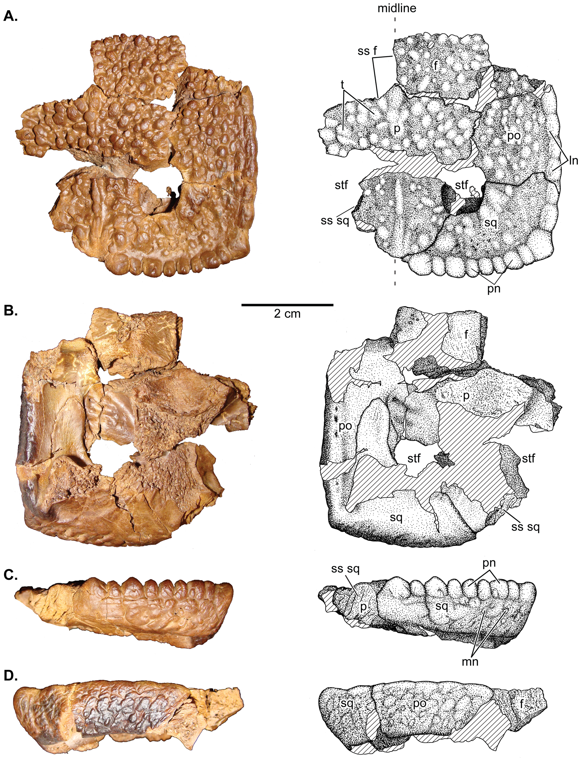 UCMZ(VP) 2008.001, a flat-headed juvenile Stegoceras validum. A, dorsal, B,ventral; C, posterior; and D, lateral views. Abbreviations: cf, cerebellar fossa; f, frontal; ln, lateral nodes; o, orbit; p, parietal; pn, posterior nodes; po, postorbital; sq, squamosal; ss, sutural surface for; stf, supratemporal fenestra.